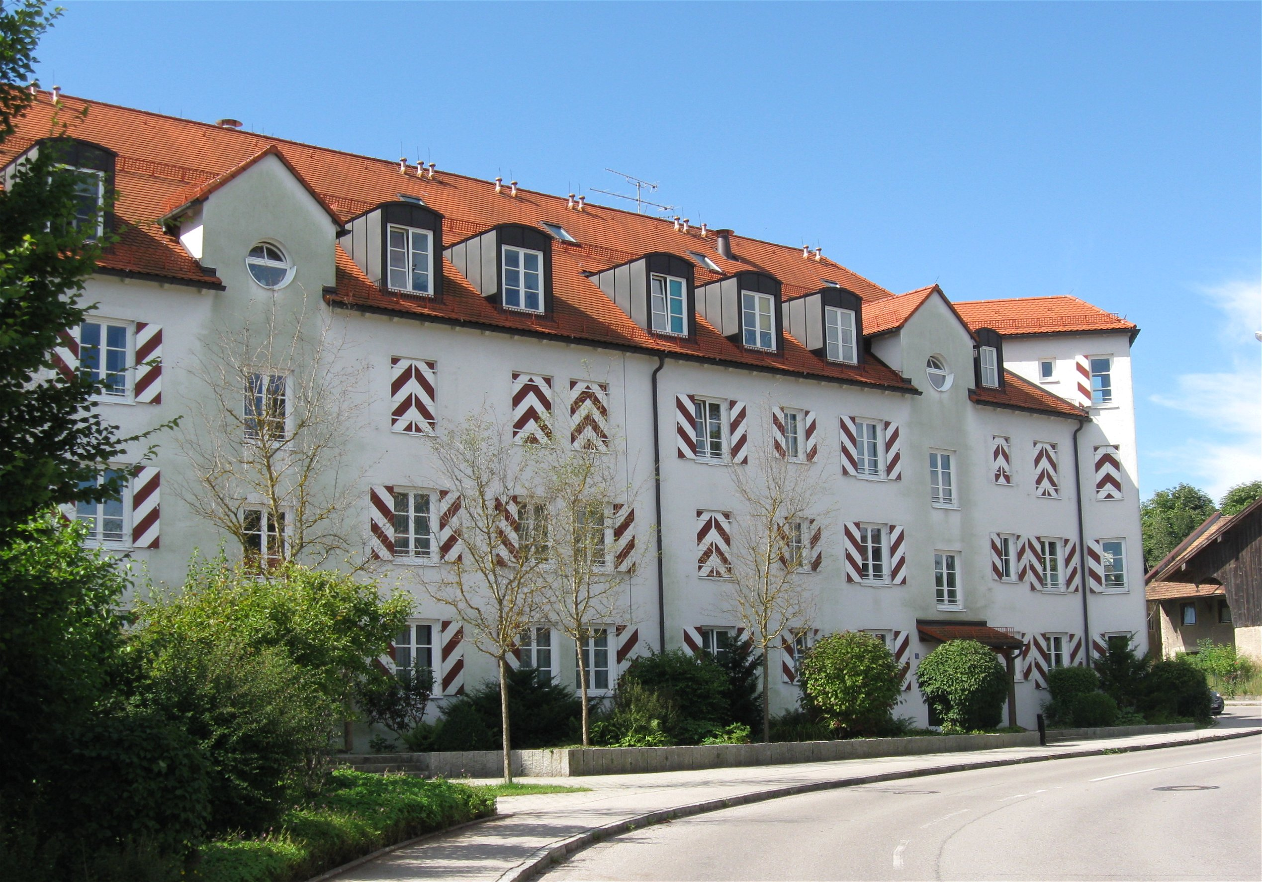 Schlossstraße 15. Ehem. Hofmarksschloss Egmating; Hauptbau, zusammenhängende Satteldachbauten mit verschiedener Firsthöhe, im Kern 17. Jh.; Brauerei- und Wirtschaftsgebäude, 2. Hälfte 19. Jh.